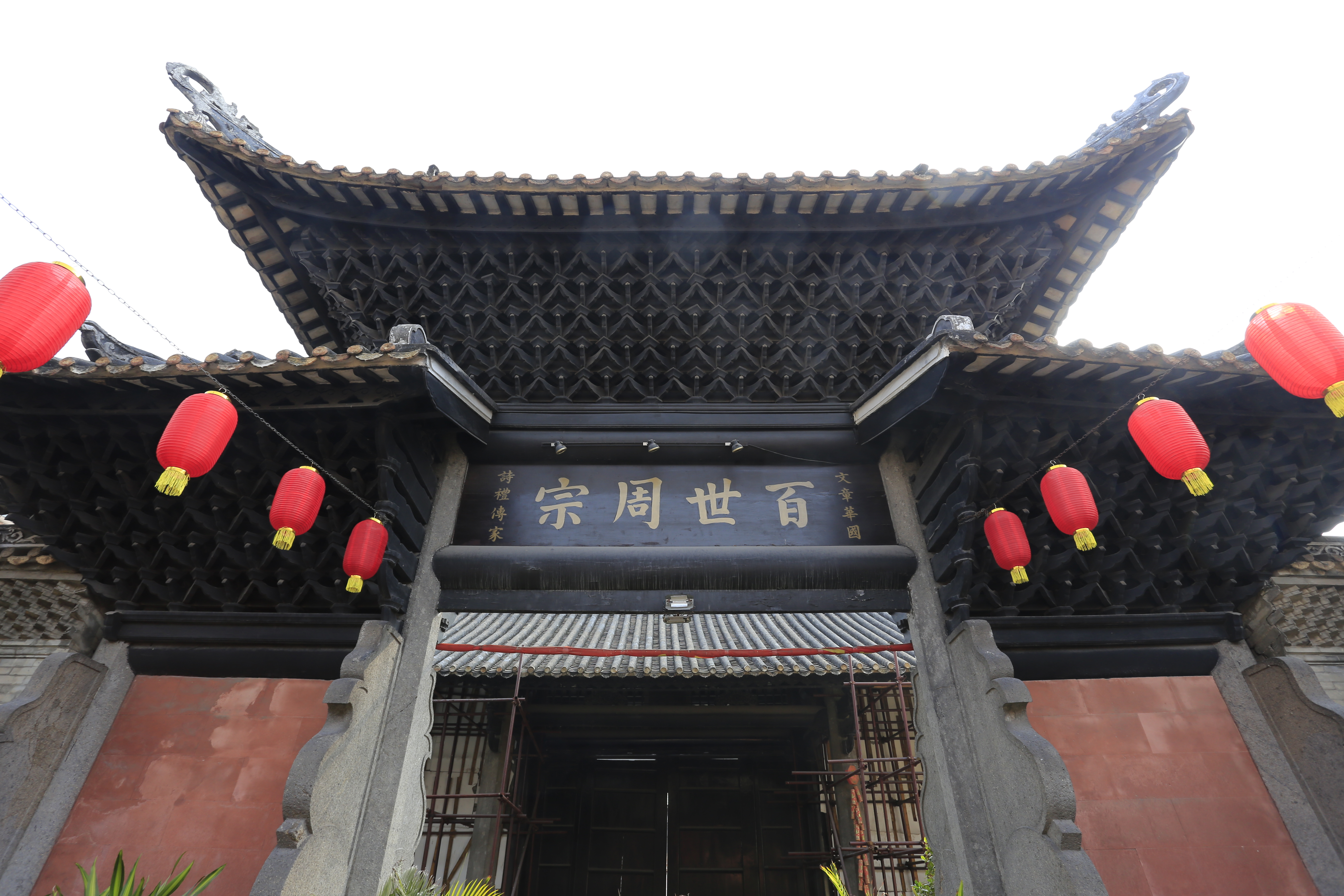 卫氏大宗祠（位于中国广东省广州市海珠区沥滘村） 牌坊